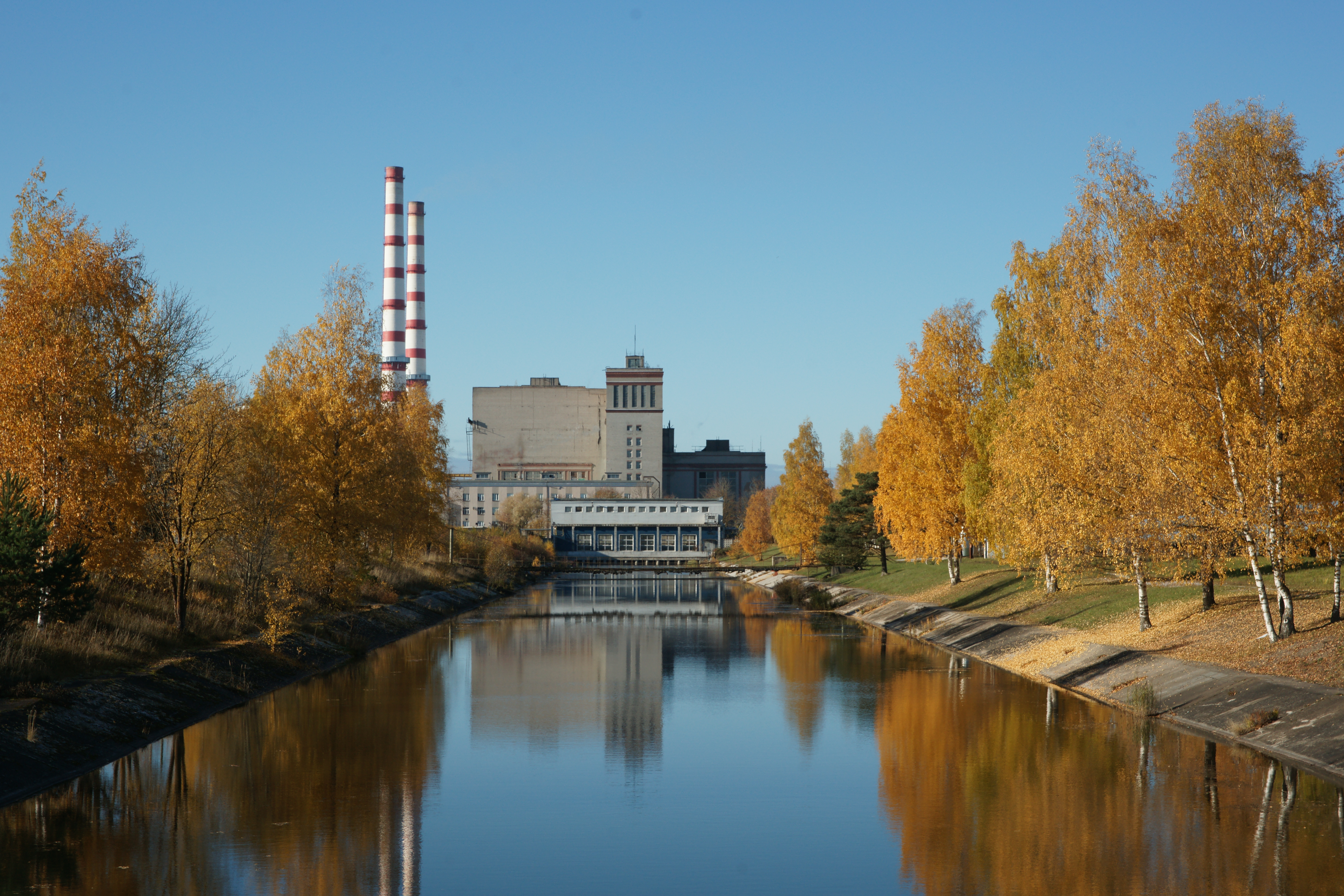 Balti Soojuselektrijaam sügis 2015